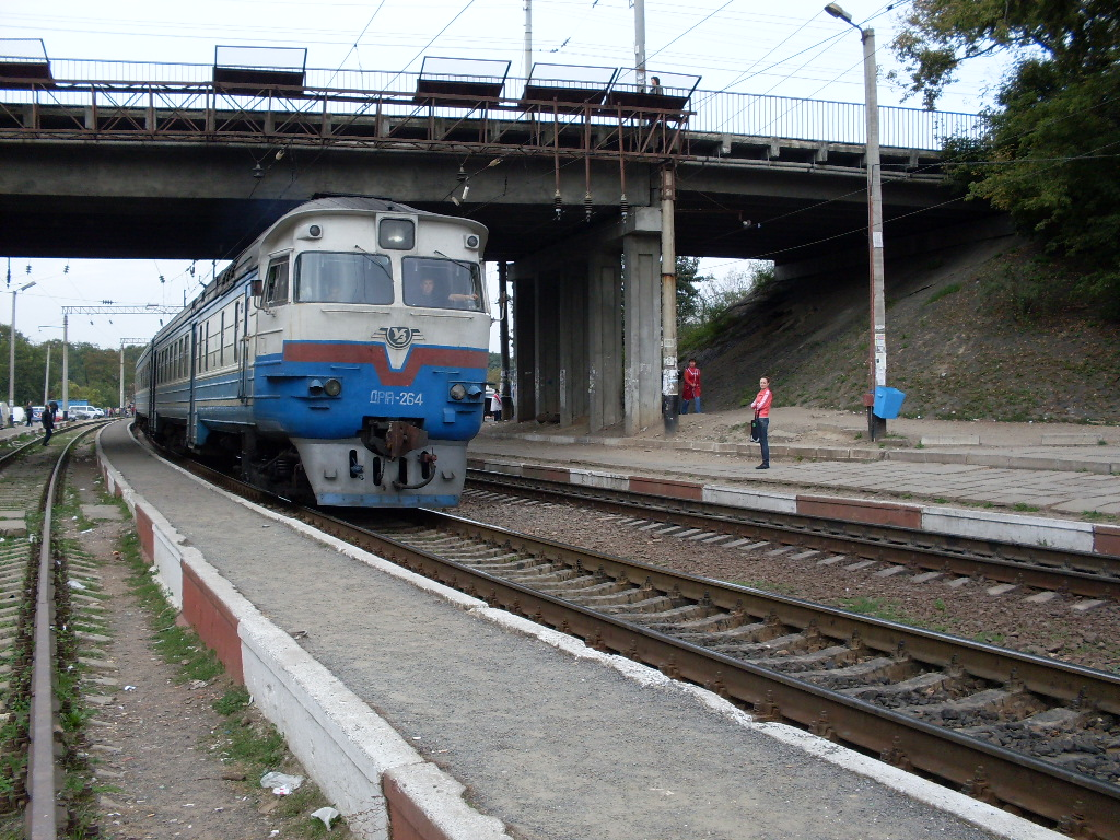 др1а-264 дизель поезд ларга каменец подольский хмельницкий